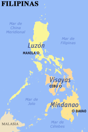 apa de Filipinas con los tres archipiélagos, sus capitales y mares circundantes.